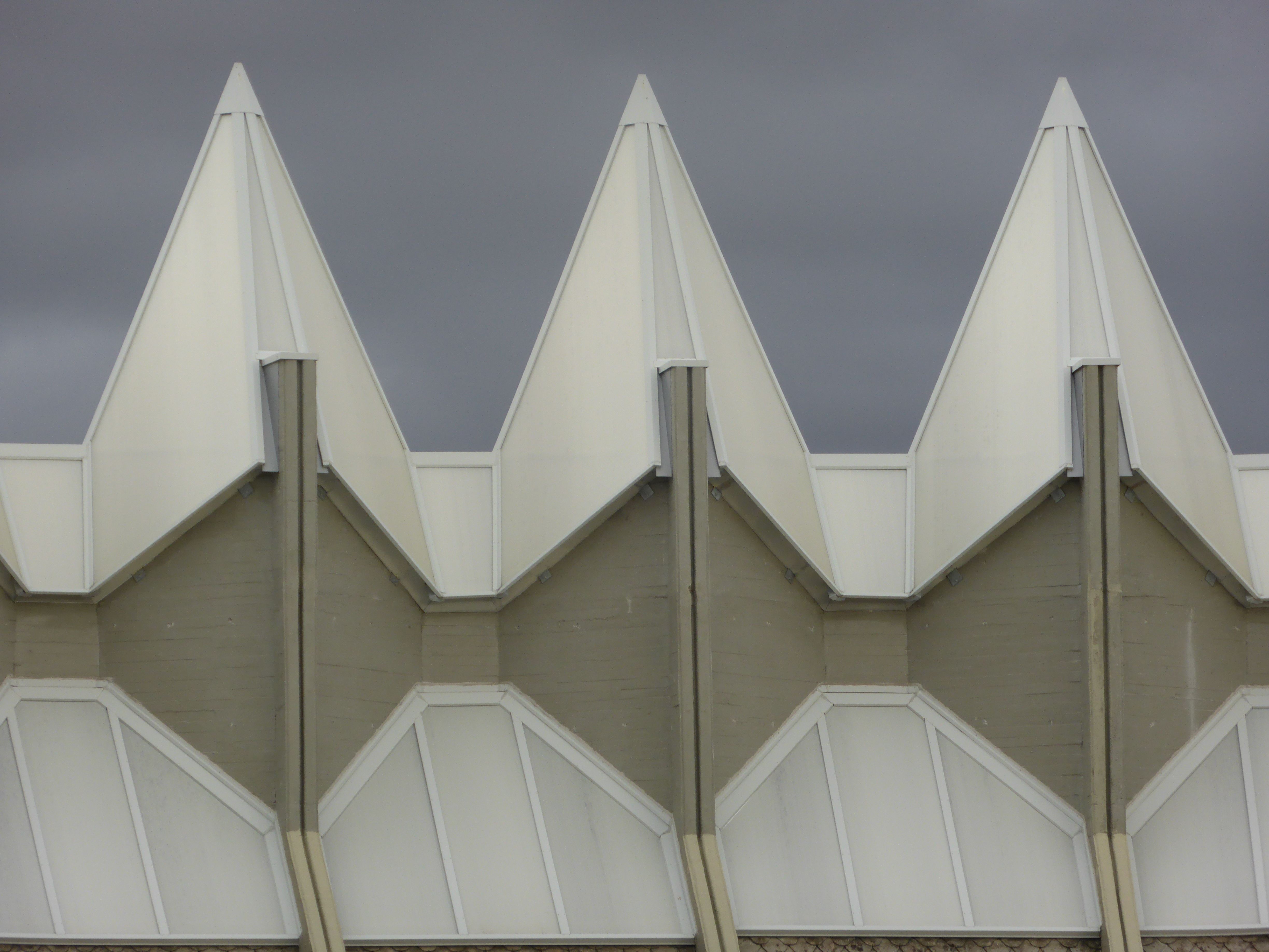 Agujas o "espinas" que coronan el inmueble sede del Instituto del Patrimonio Cultural de España (IPCE), en la Ciudad Universitaria de Madrid.